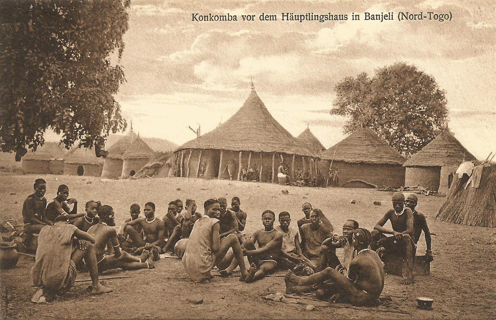 Konkomba vor dem Häuptlingshaus in Banjeli (Nord-Togo). Carte postale ancienne, sans indication d'auteur, d'éditeur ou de date. Collection particulière